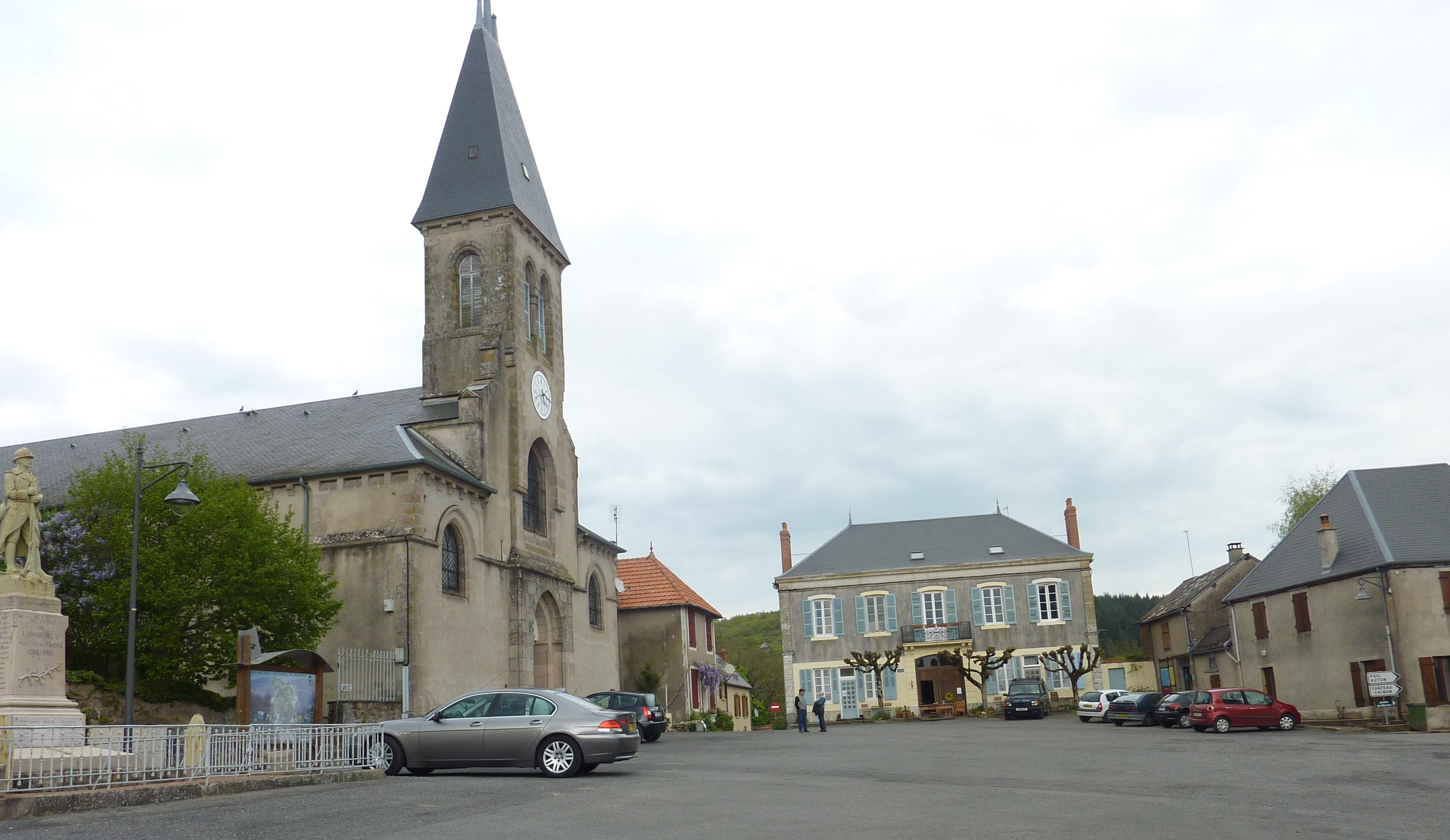 Larochemillay (Nièvre) : la place du village